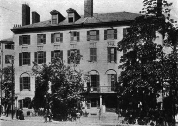 Boston, Massachusetts